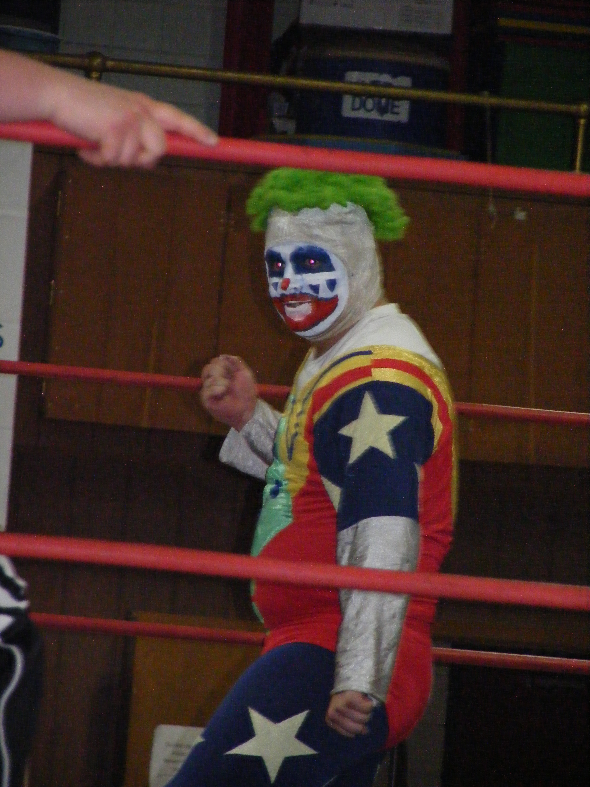 Doink the Clown.